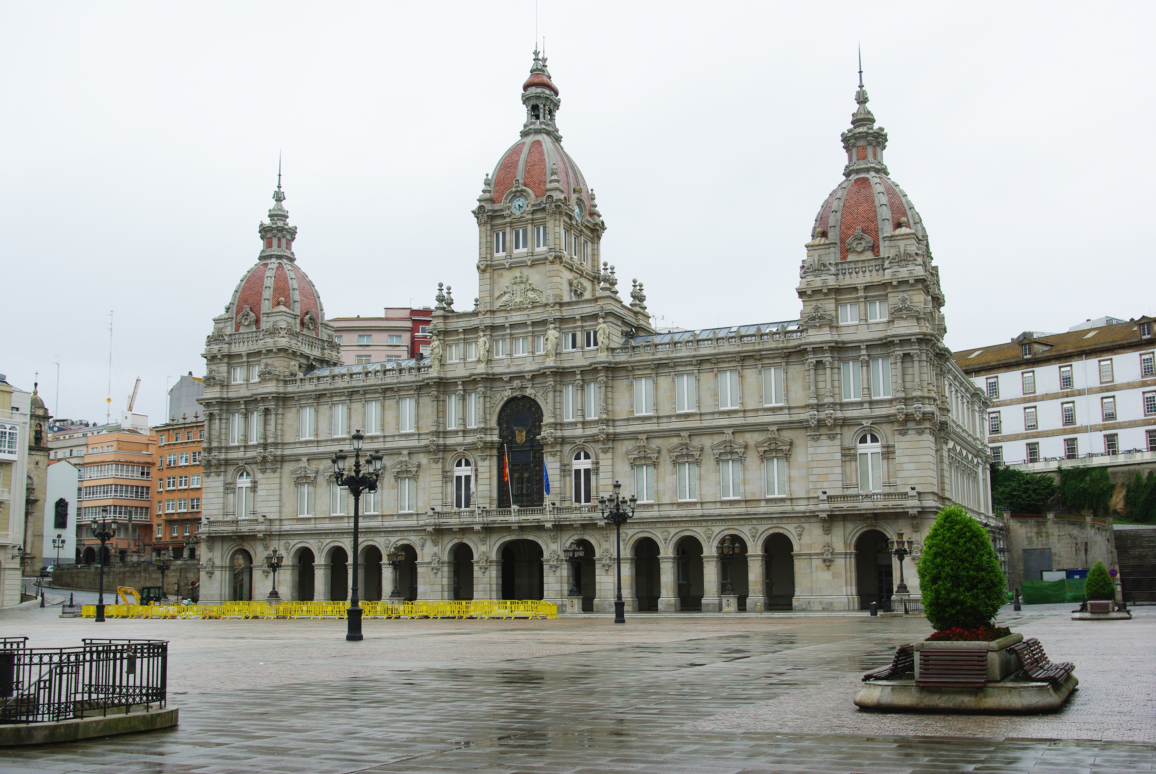 A Coruña. Casa do concello, Galicia (Spain)